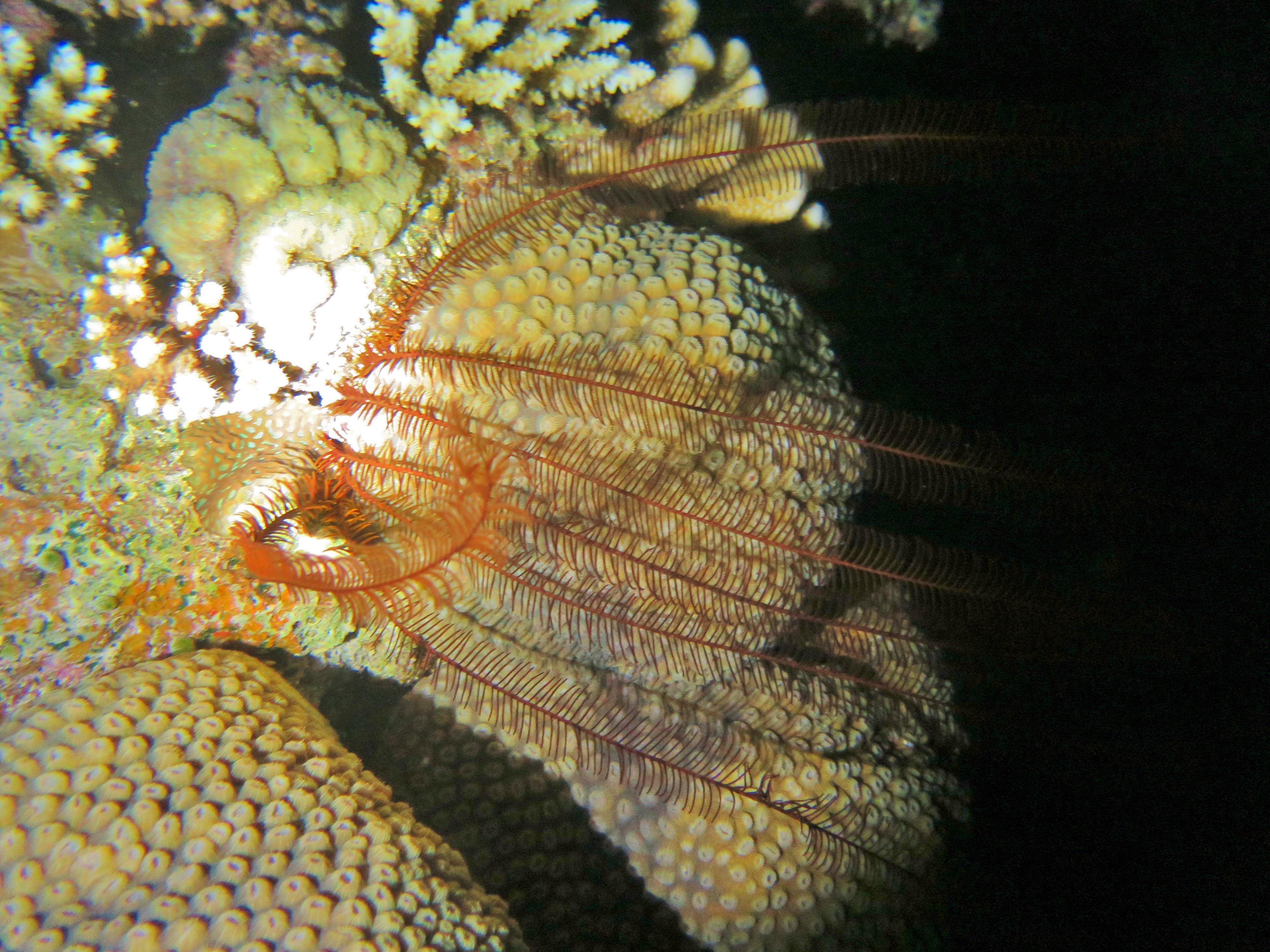 Un crinoïde Alloeocomatella pectinifera aux Maldives (atoll Ari). ID : Charles Messing & Frédéric Ducarme.